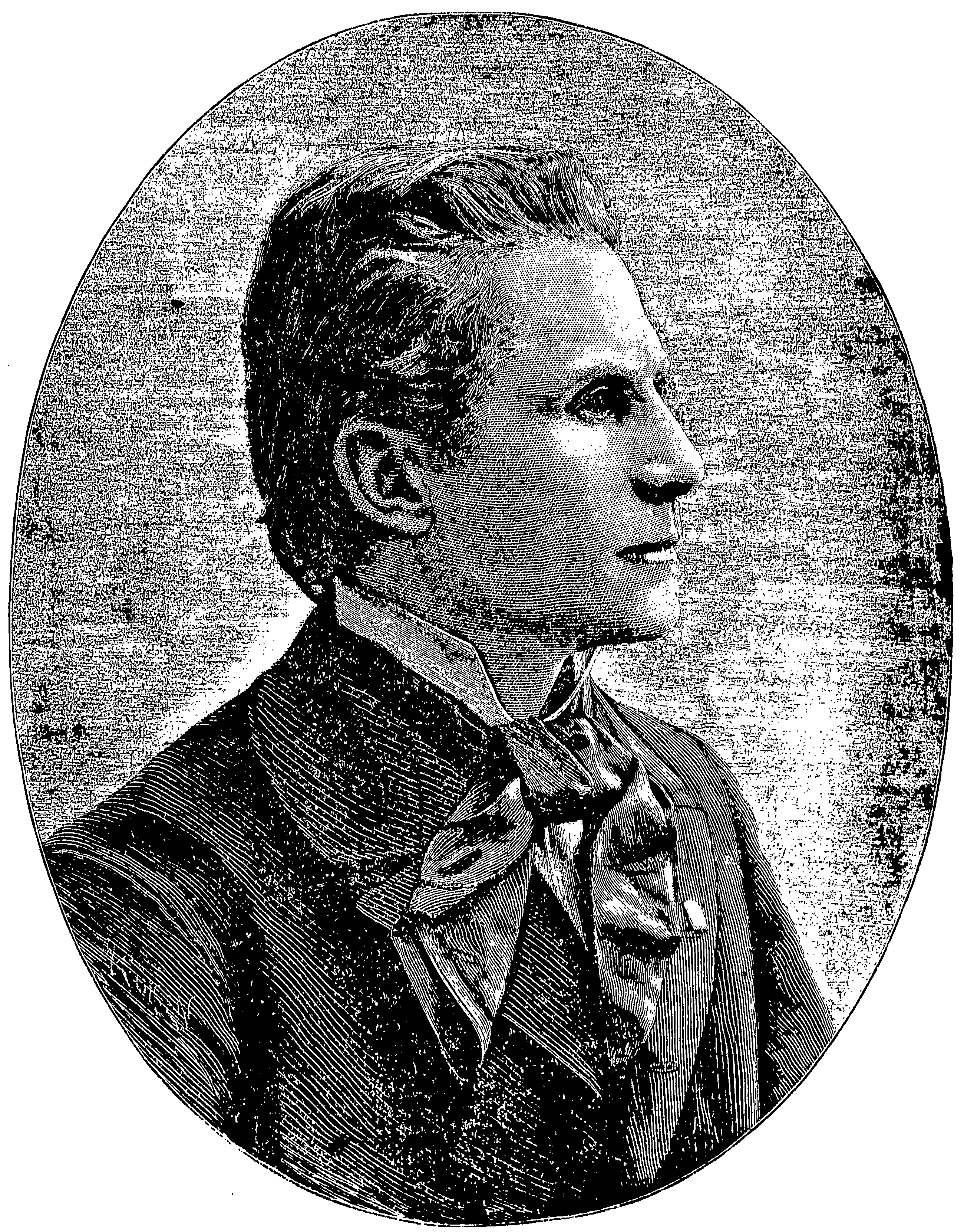 Den norske legen Oscar Nissen.